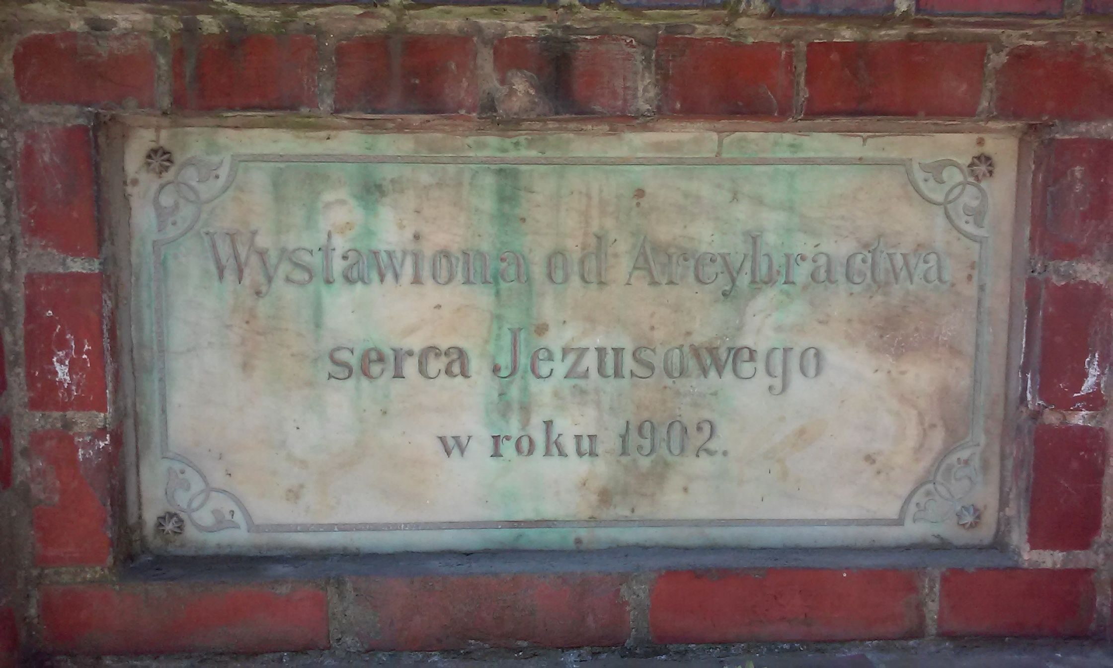 Tablica pamiątkowa na kapliczce ufundowanej przez Bractwo Serca Jezusowego w 1902 roku, w Gdańsku Matarni, koło kościoła p. w. św. Walentego.